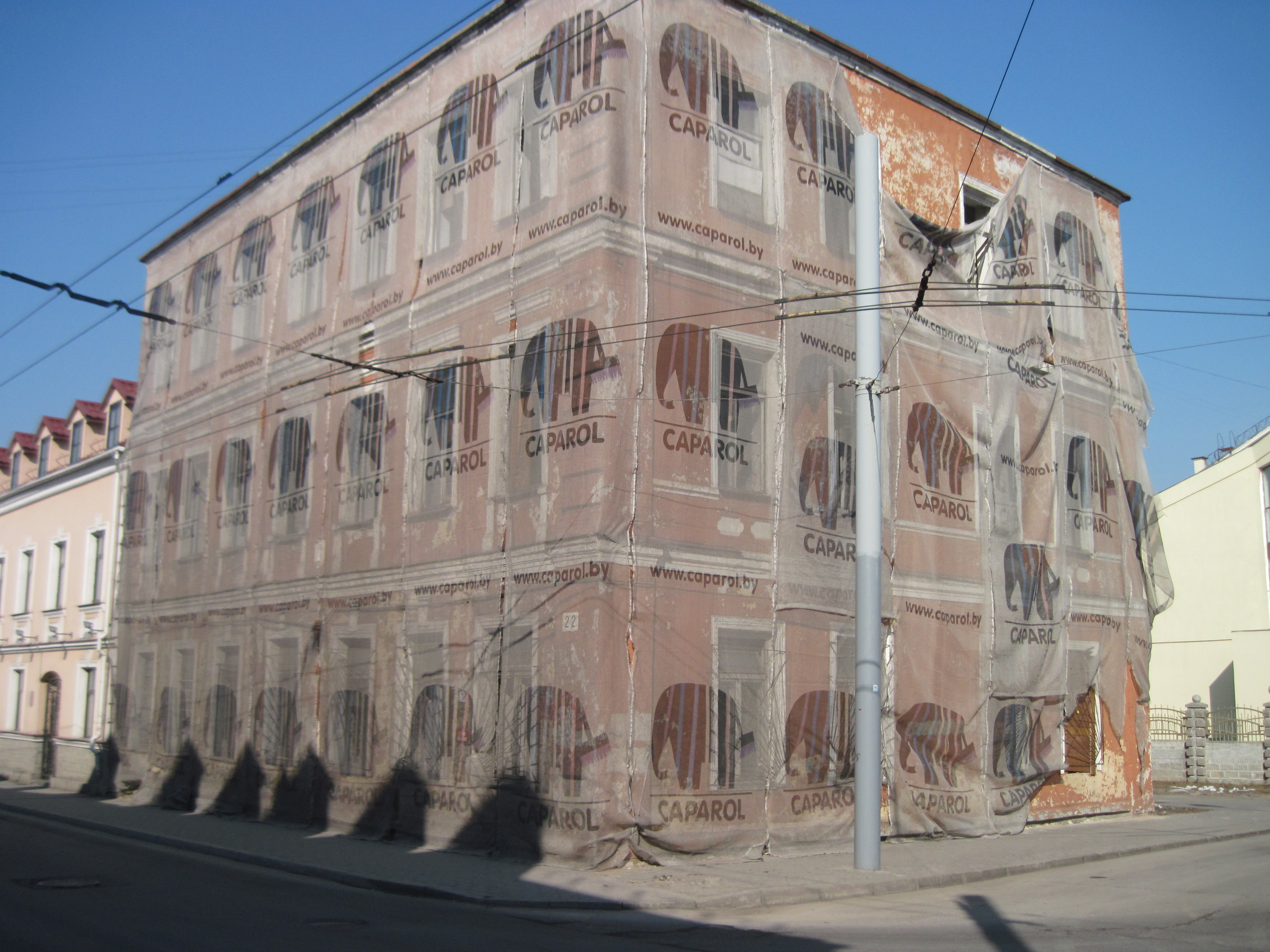 Забудова гістарычнага цэнтра Гродна. Вуліца К. Маркса, 22